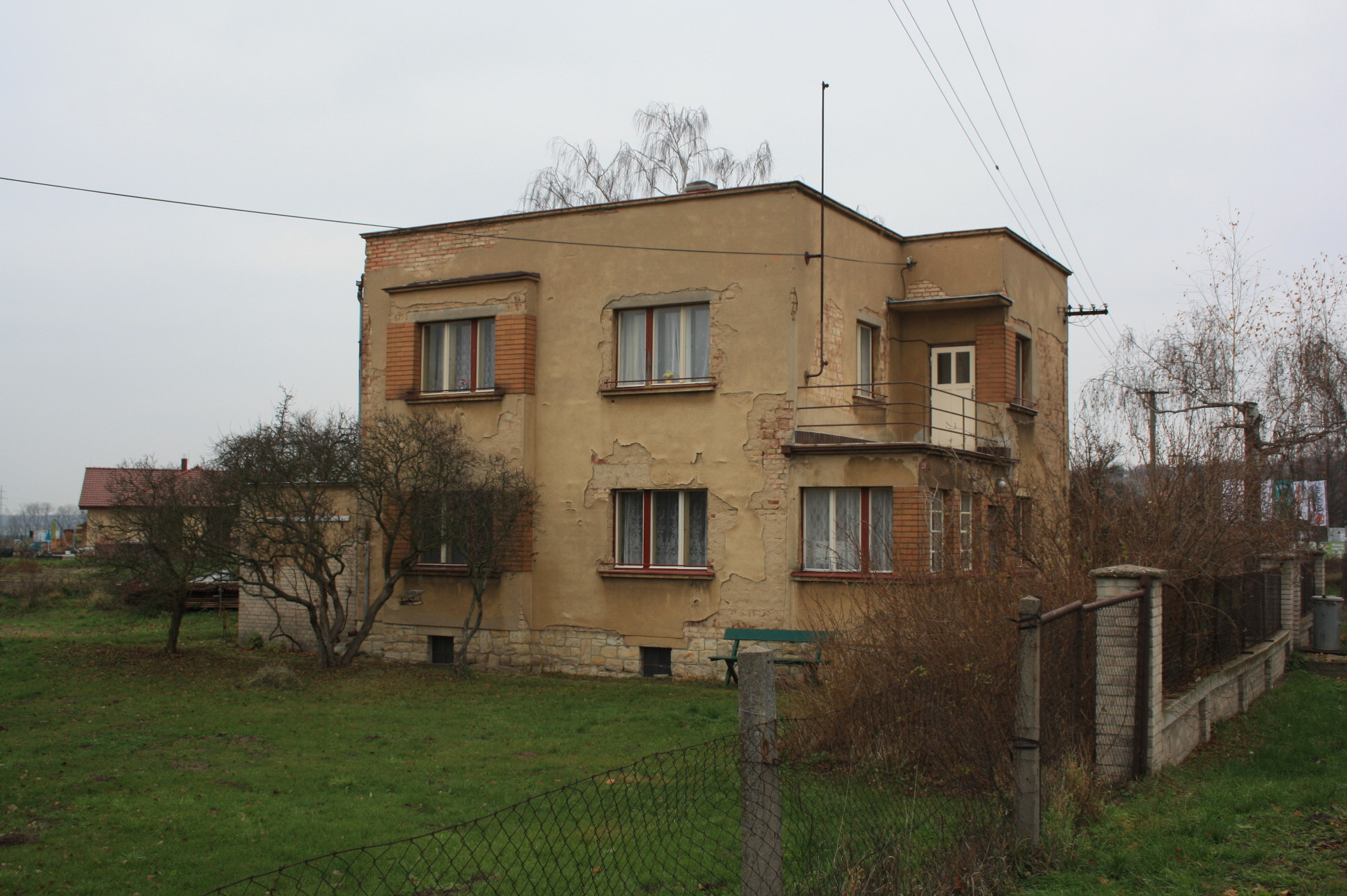 Vila číslo popisné 237 v Krauzovně, části obce Kly (pohled od jihu).